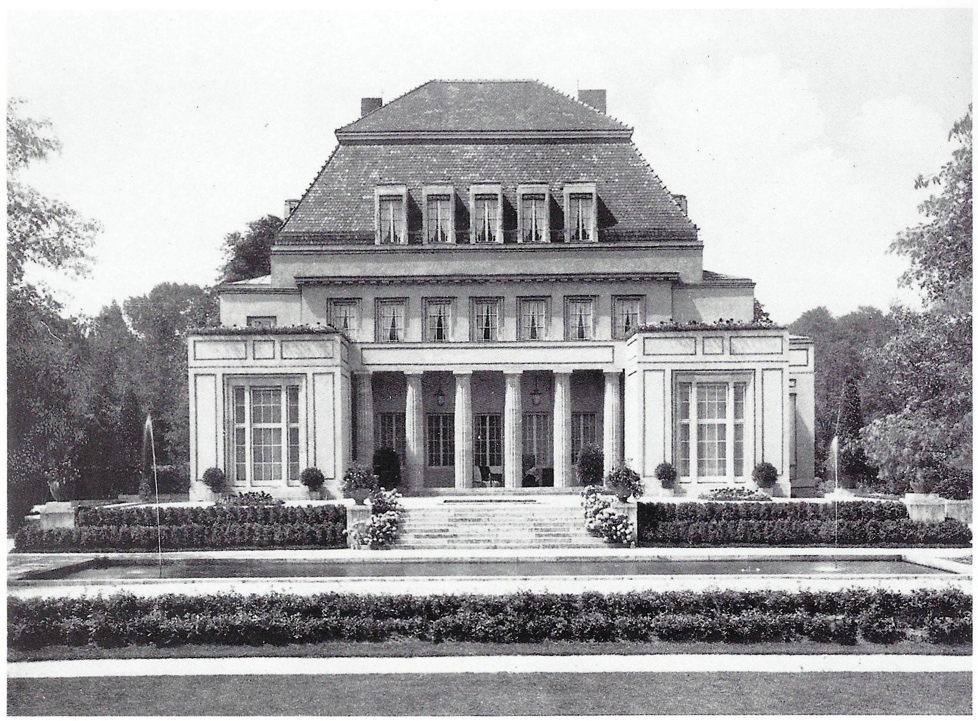 Haus Feinhals (erbaut 1908/09, 1943 kriegszerstört), Lindenallee 3, Köln-Marienburg: Ansicht vom Garten